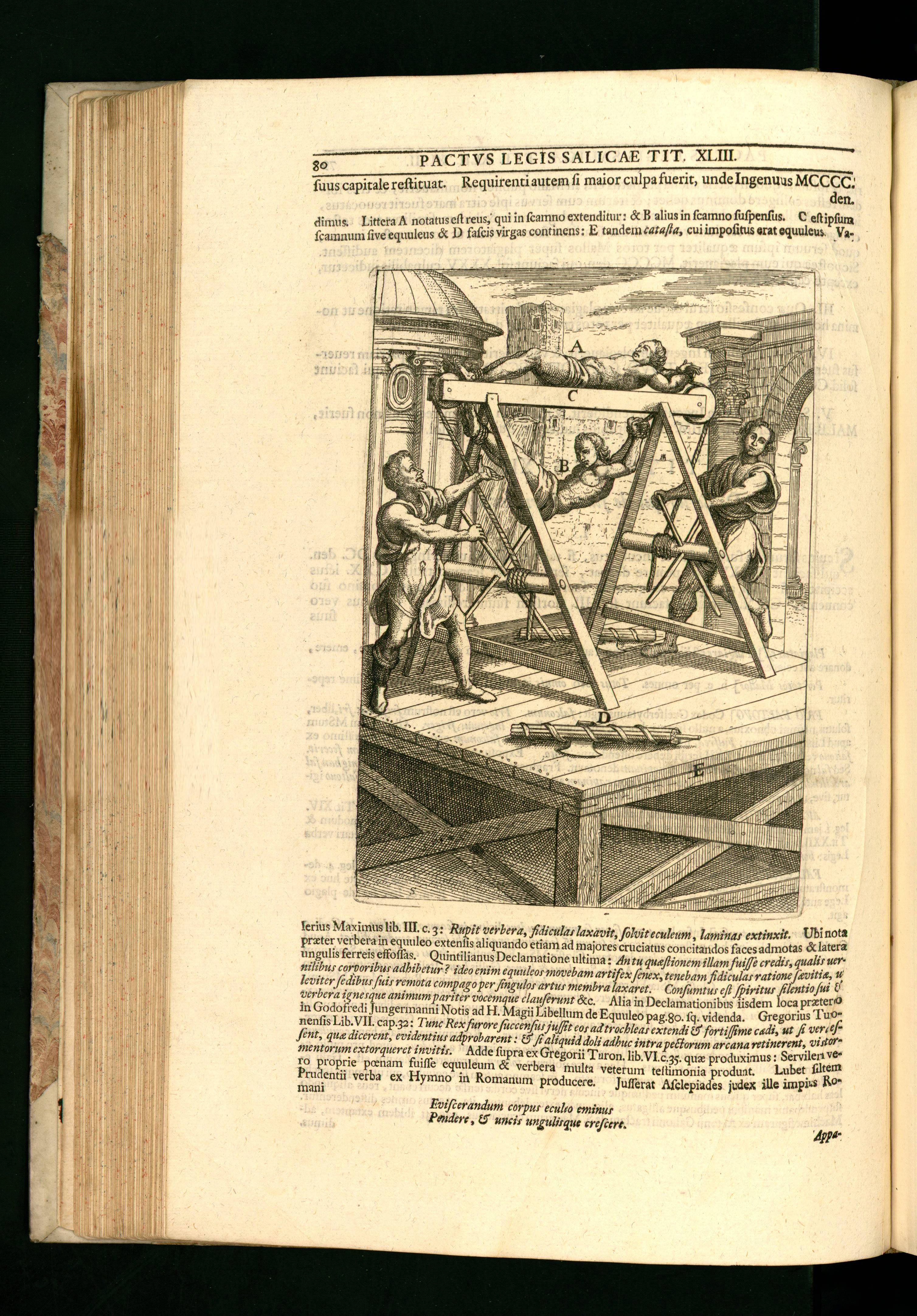 Leges Francorum Salicae et Ripuariorum, cum additionibus regum et imperatorum variis